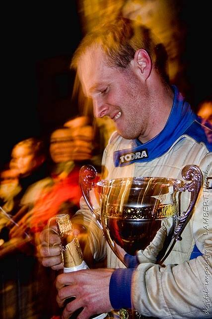 Sébastien Dommerdich célèbre sa victoire.